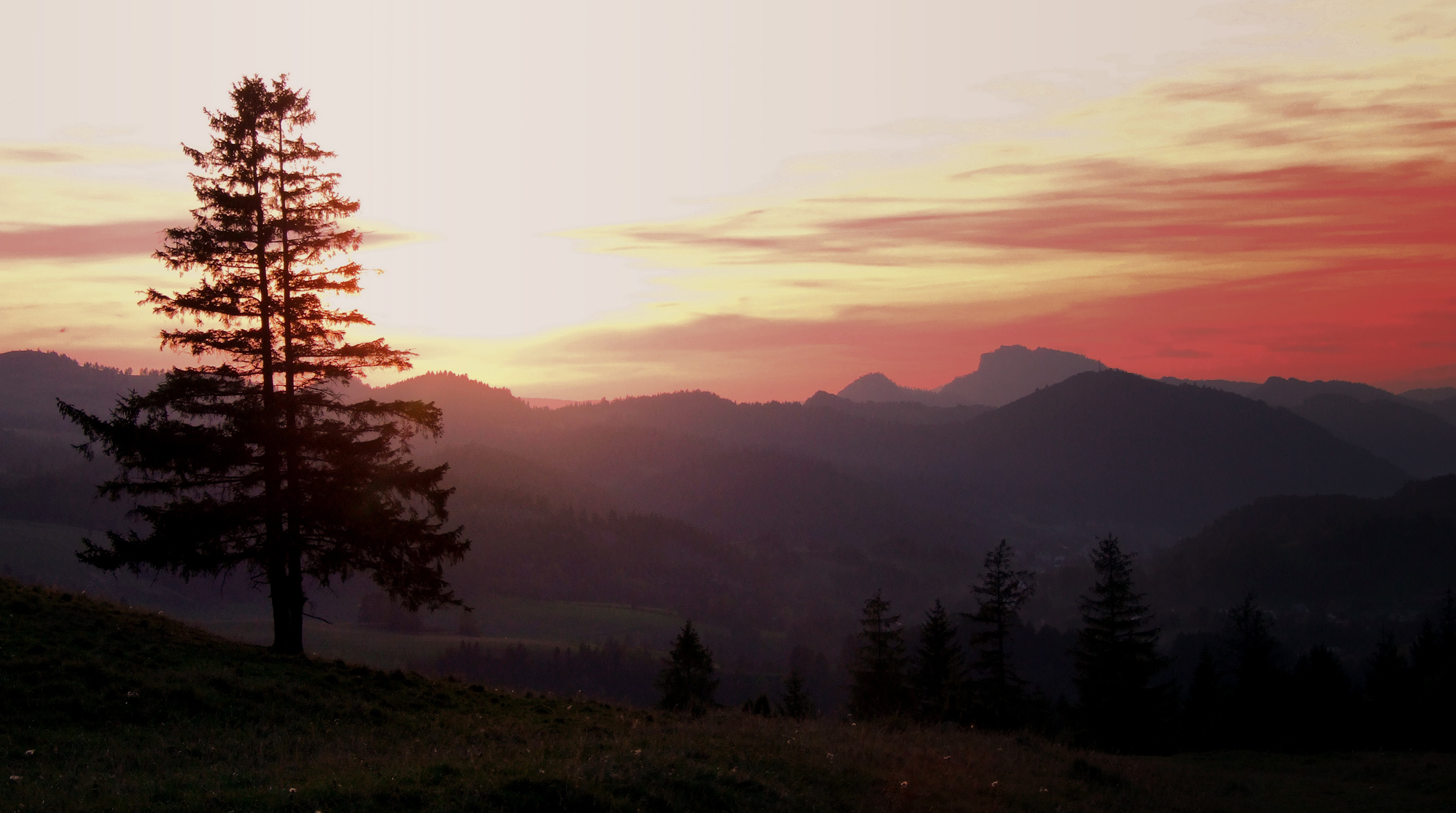 Pieniny, widok z Beskidu Sądeckiego